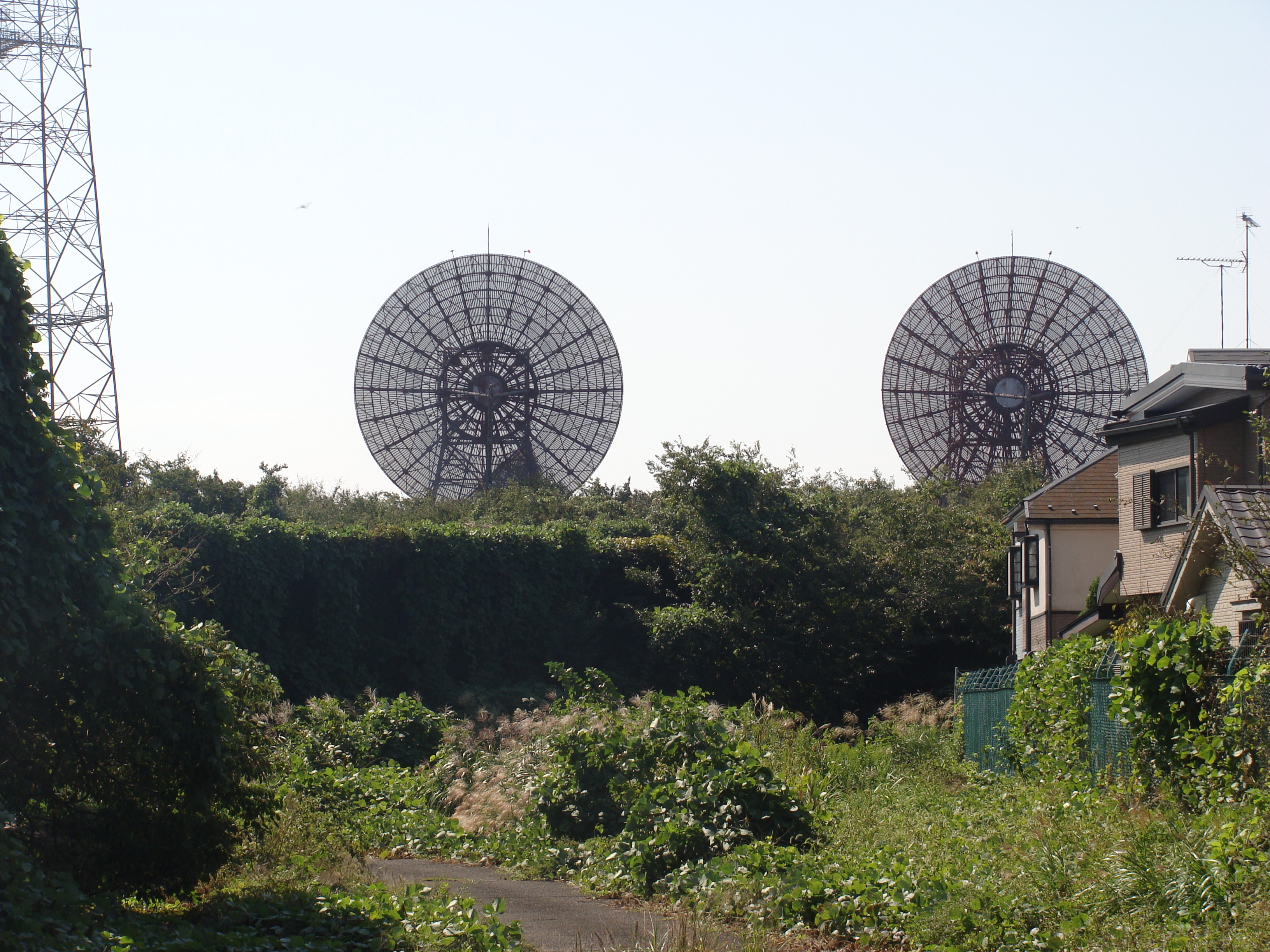 府中通信施設内にあるパラボラアンテナ（府中トロポサイト）